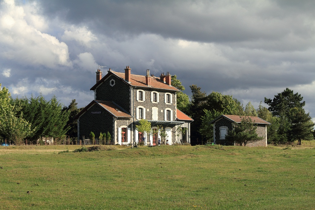 La gare de Pradelles en août 2011, Haute-Loire, France.